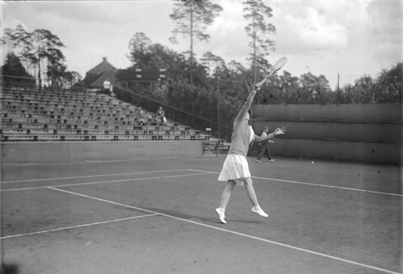 Die amerikanische Tennisweltmeisterin Helen Wills in Berlin! Interessante Spielmomente der Tennisweltmeisterin Helen Wills auf den Rot-weis-Tennisplätzen in Berlin-Grunewald.